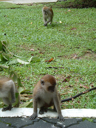 馬來西亞檳城州喬治城檳城植物園。 作者：kkiwey 拍摄时间：2005年7月